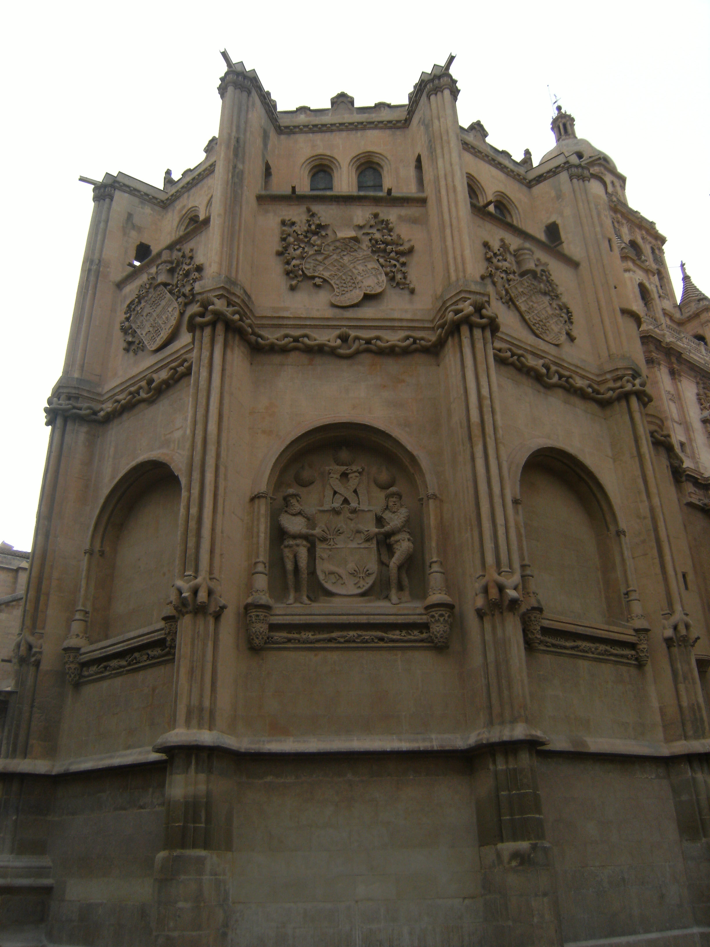 Exterior de la capilla de los Vélez de la Catedral de Murcia (Región de Murcia, España), del siglo XV.